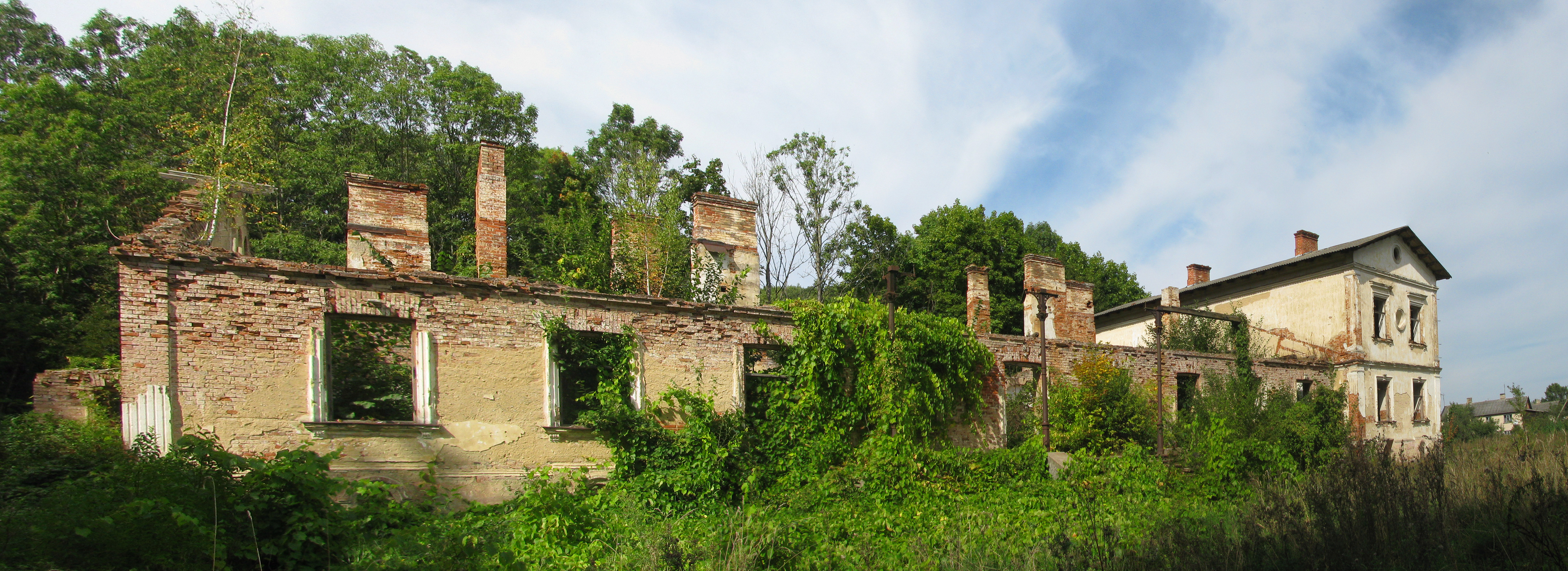 Беларуская (тарашкевіца): Рэшткі сядзібна-паркавага комплексу. в. Каштанаўка This is a photo of Belarusian heritage monument. Reference number: 113Г000614 ( WLM)